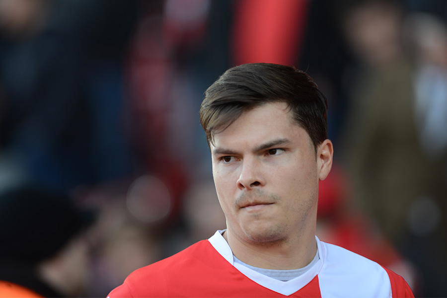 Fabian Schönheim betritt den Platz